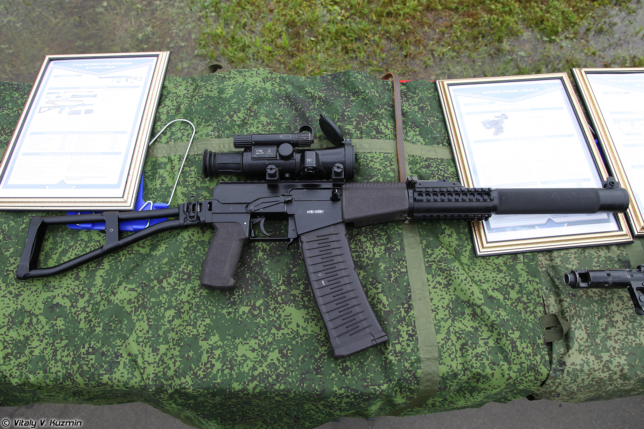 Автомат специальный модернизированный АСМ Вал 6П30М (Modernized assault rifle ASM Val 6P30M)